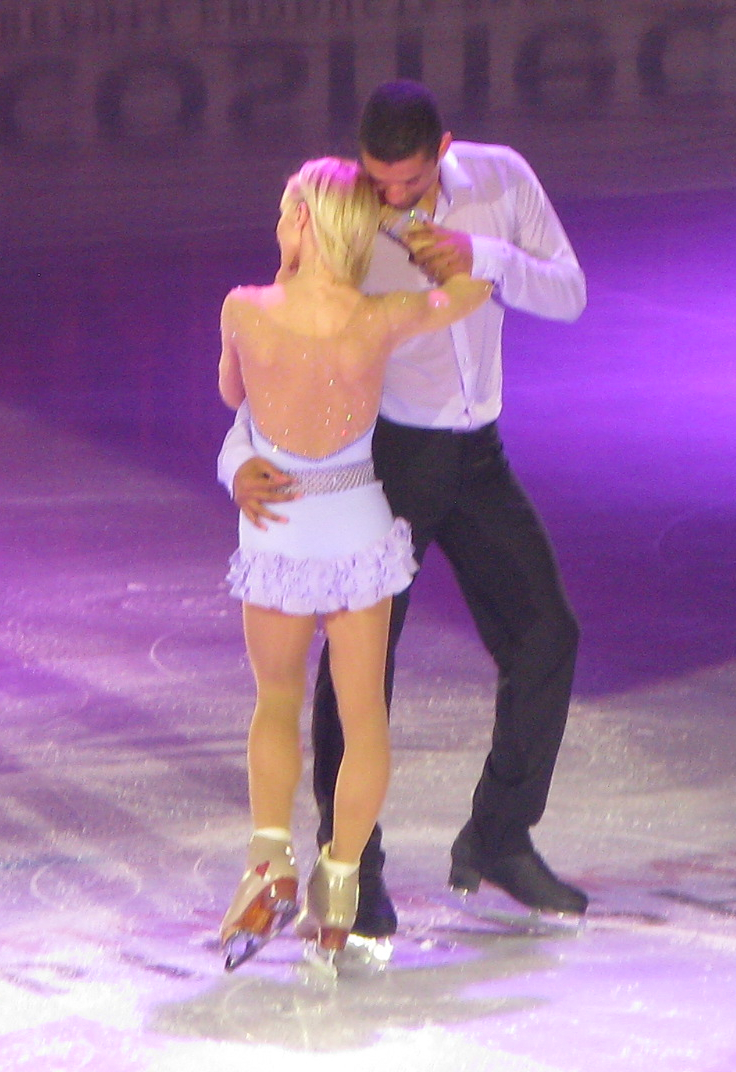 Aliona Savchenko et Robin Szolkowy au gala des Championnats du monde de patinage artistique 2012 à Nice.